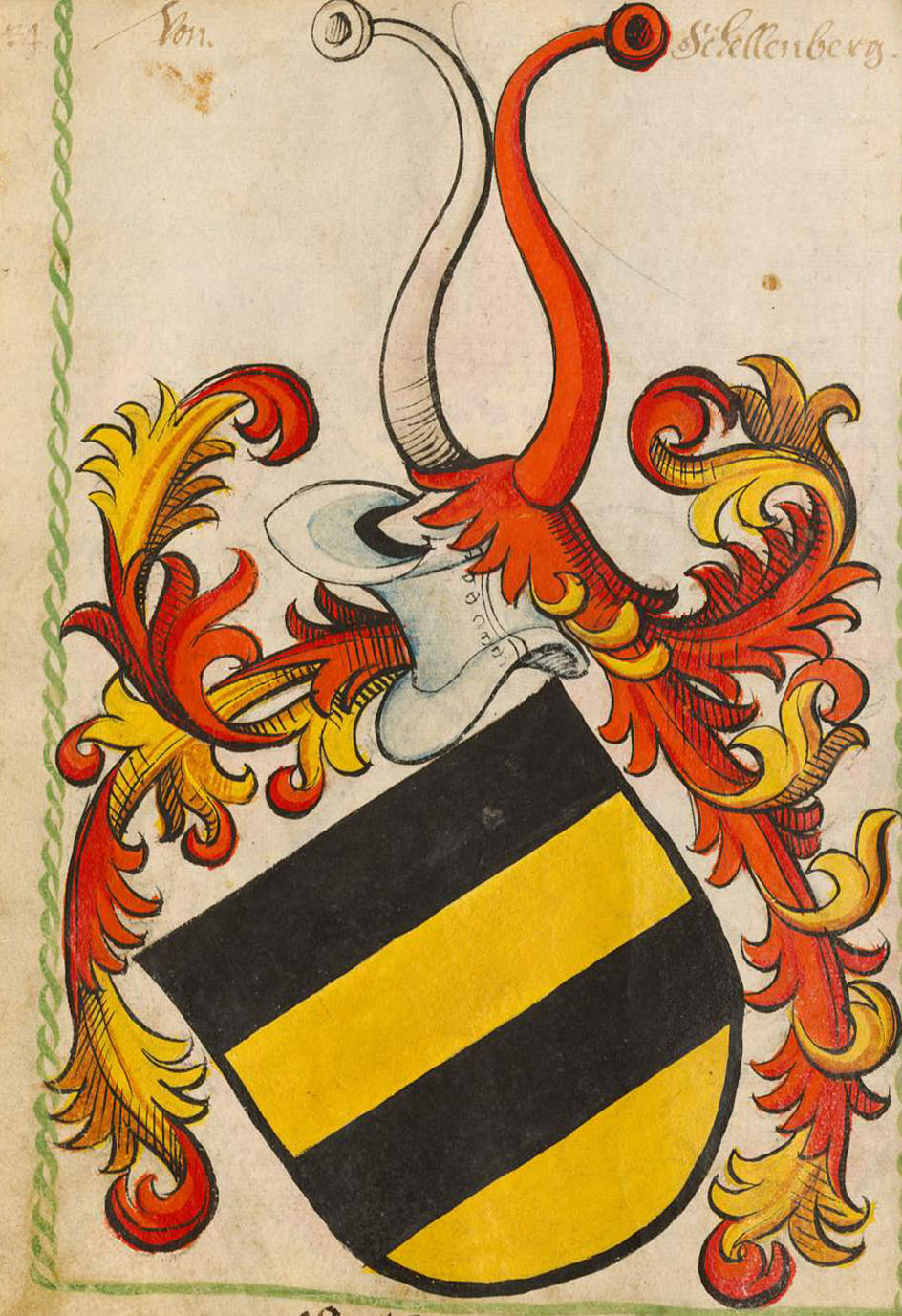 Scheibler'sches Wappenbuch, älterer Teil Schellenberg